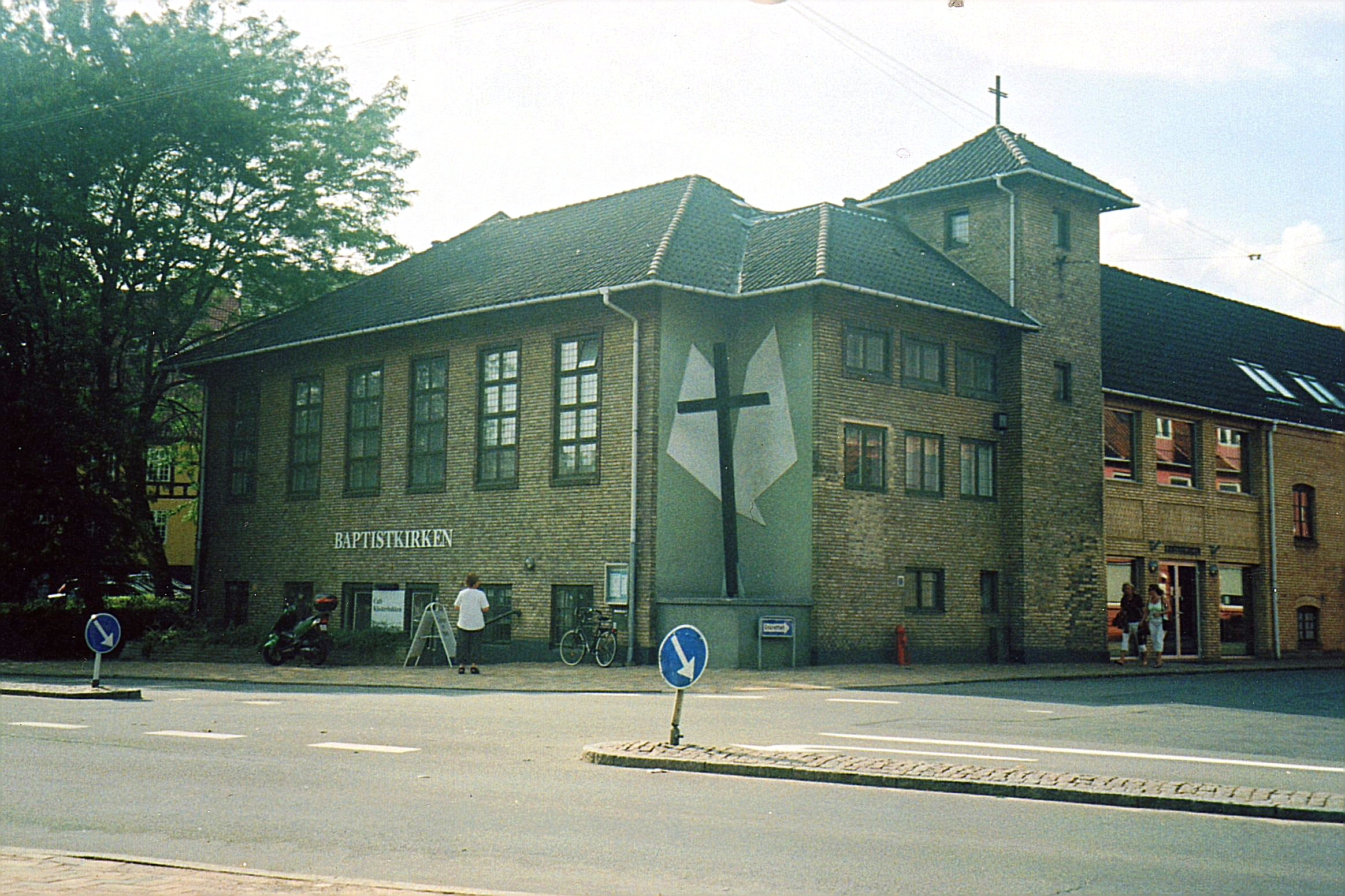 Baptistkirken, Odense Kommune